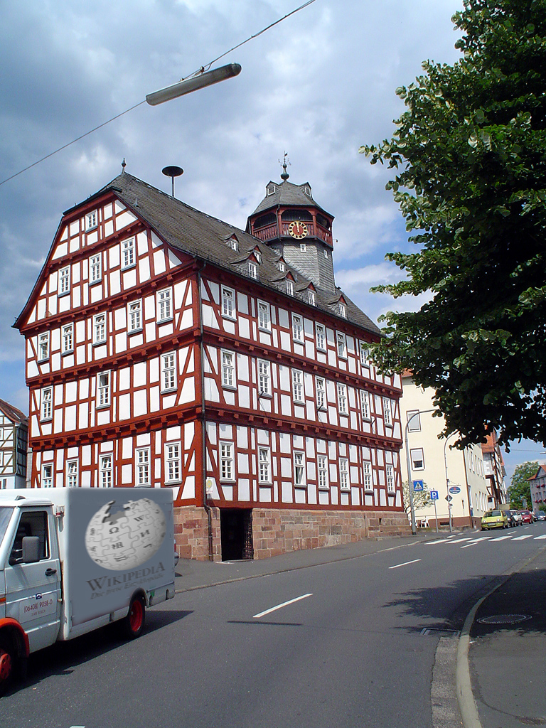 Rauschenberg, City hall (Germany/Hesse)